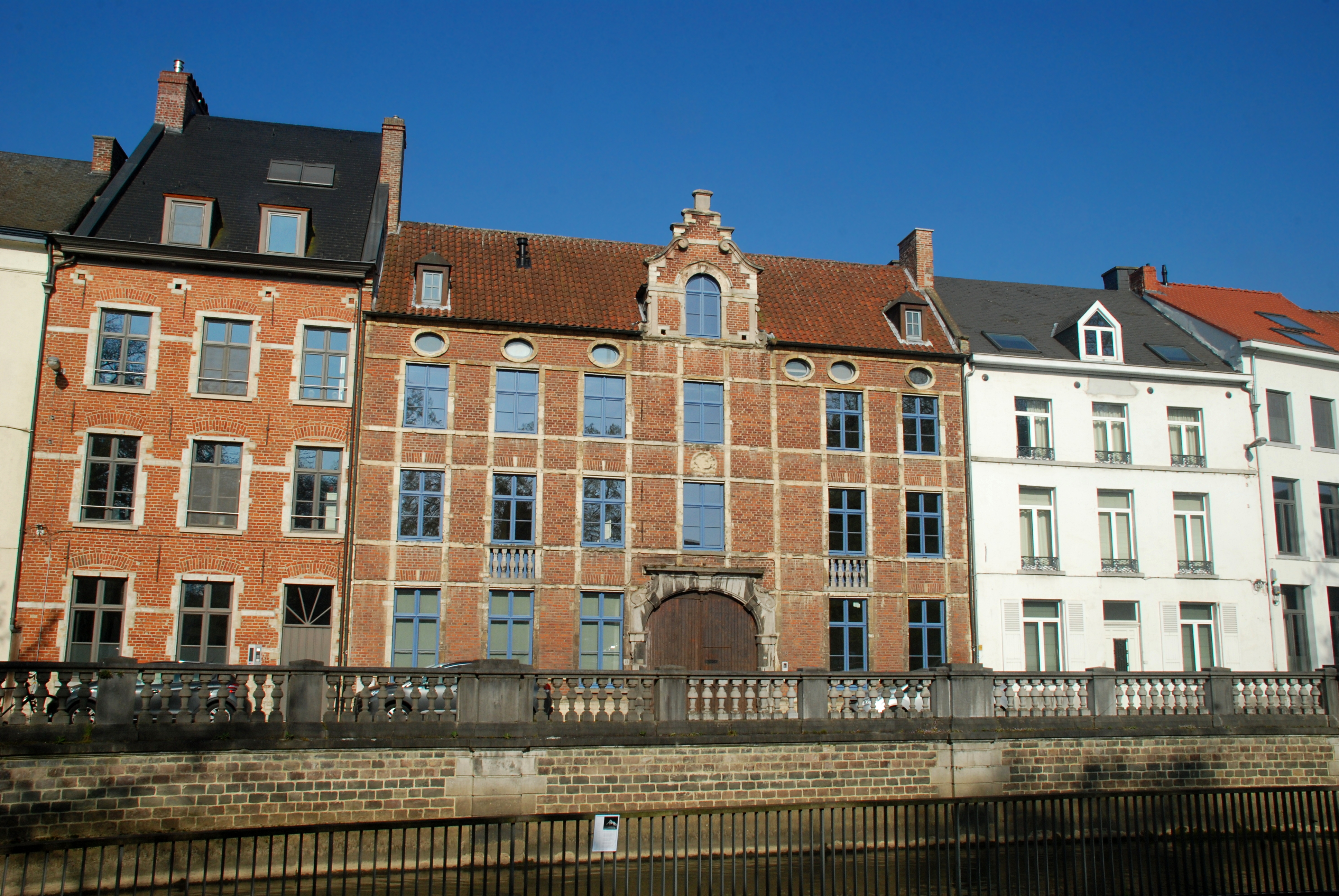 Belgique - Louvain - Brasserie de Jonge Sint-Jacob